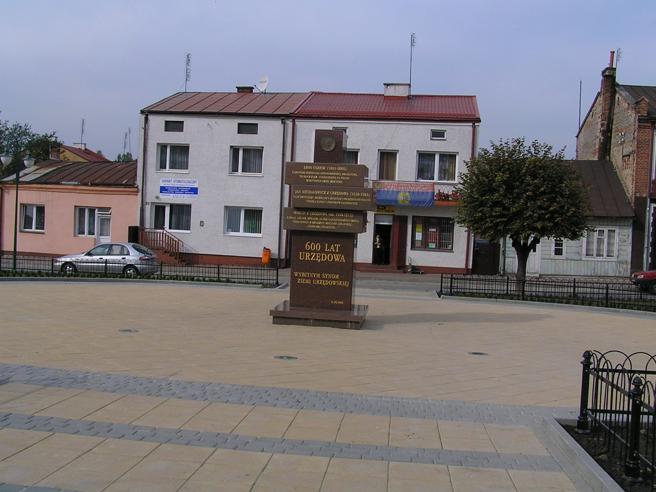 autor: ~~yarek shalom